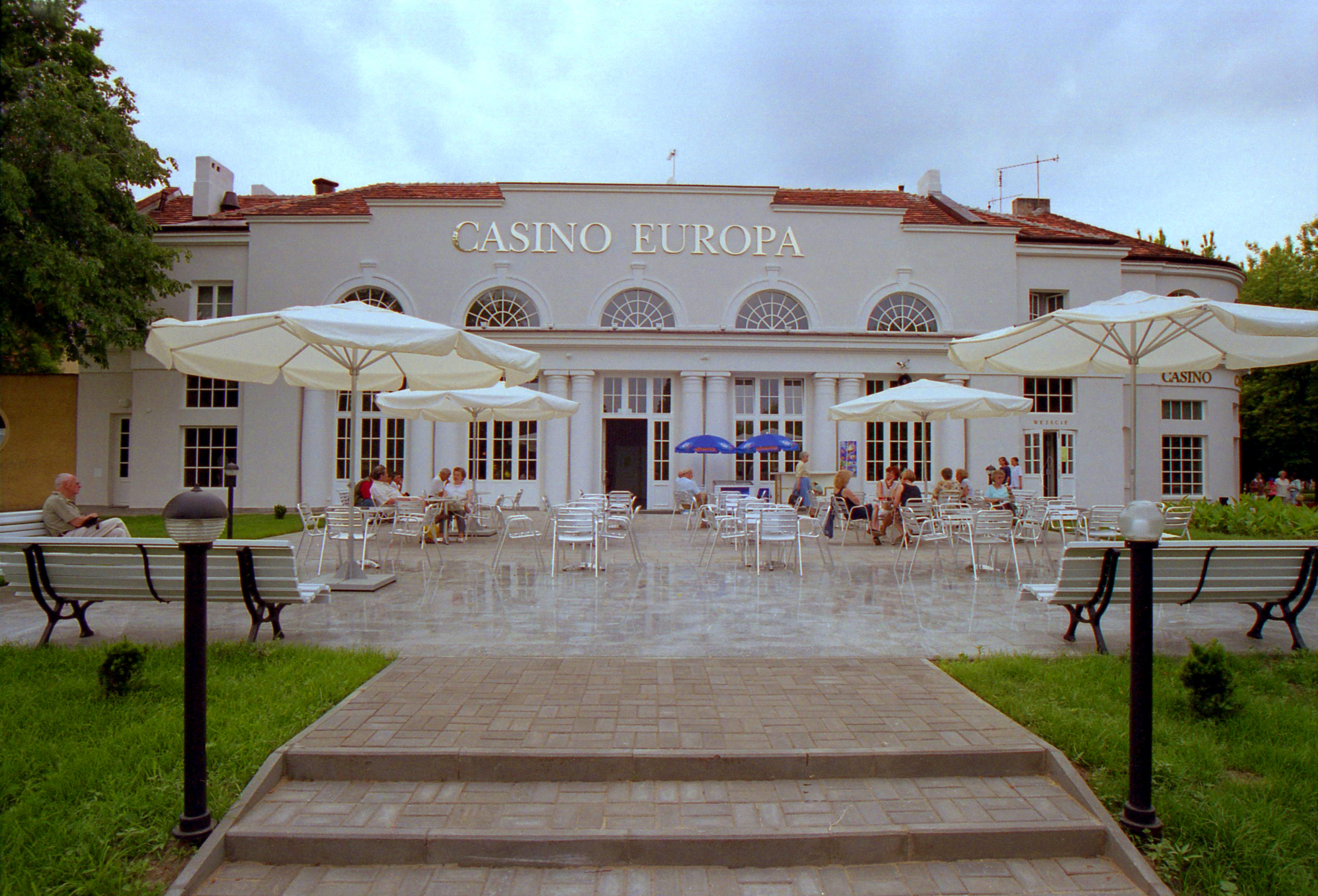 Ciechocinek, ul. Nieszawska 2/4 / Zdrojowa 1/3 - dawne kasyno "Europa", obecnie budynek restauracyjno-handlowy „Europa”, 1933 (zabytek nr A/1220)